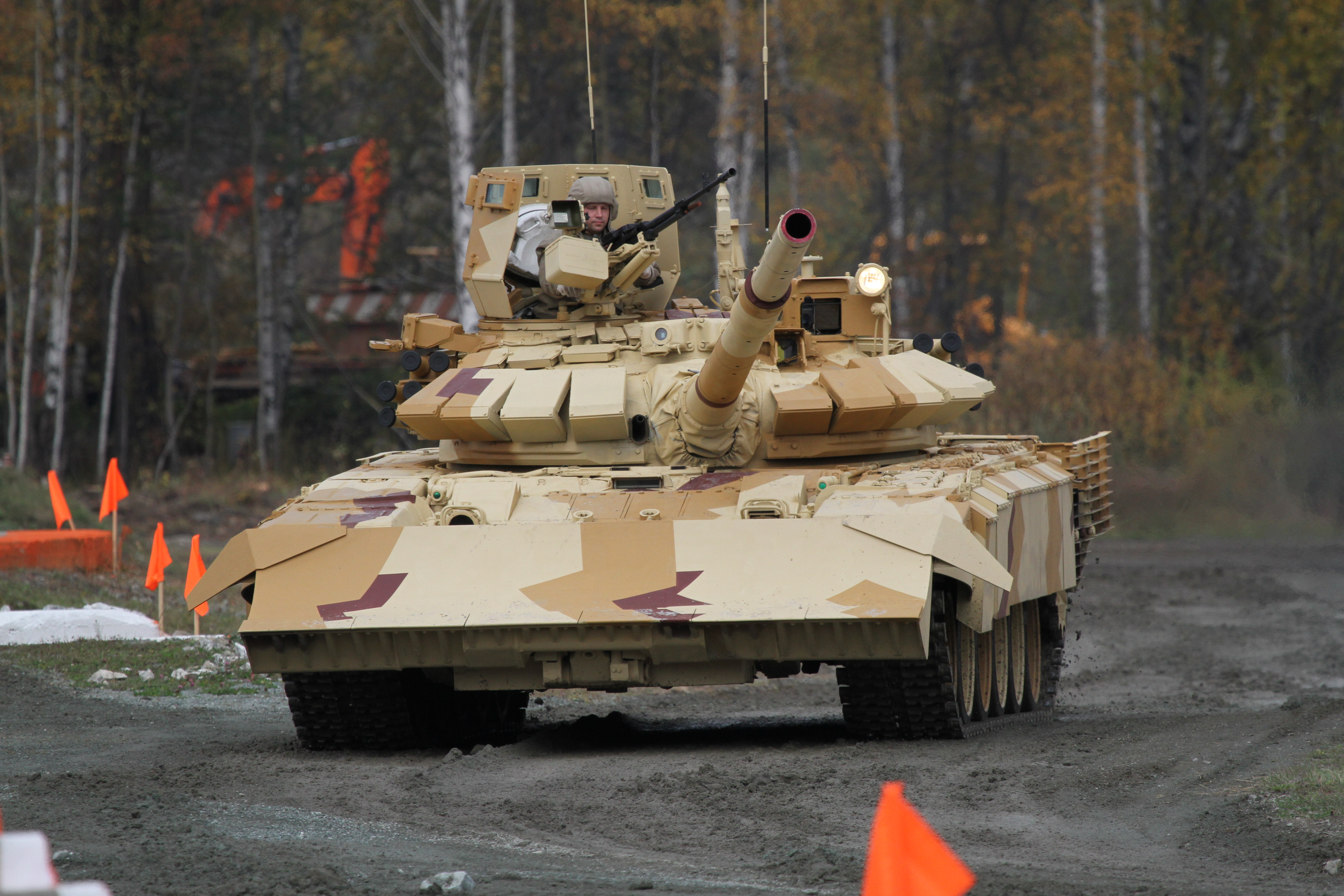 Модернизированный Т-72 с комплектом средств защиты для ведения боевых действий в городских условиях (Modified T-72 with additional protection kit for urban survival)